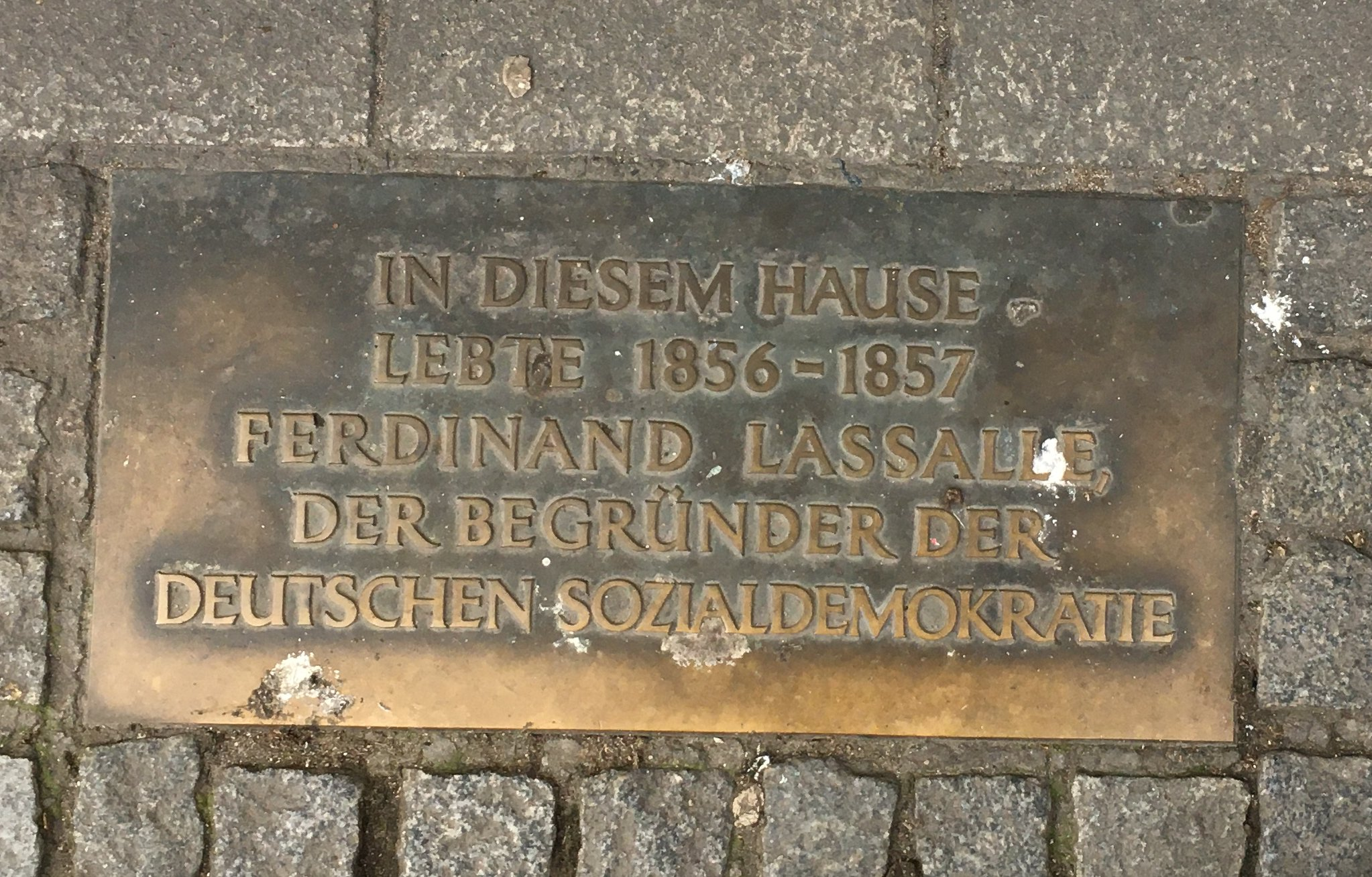 Düsseldorf-Friedrichstadt-Friedrichstrasse-zugeschnitten